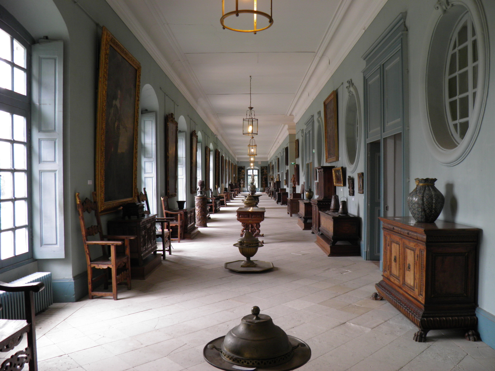 Galerie du premier étage du château-musée Jacquemart-André de l'abbaye de Chaalis. Fontaine-Chaalis, Oise. Vue depuis l'aile est.